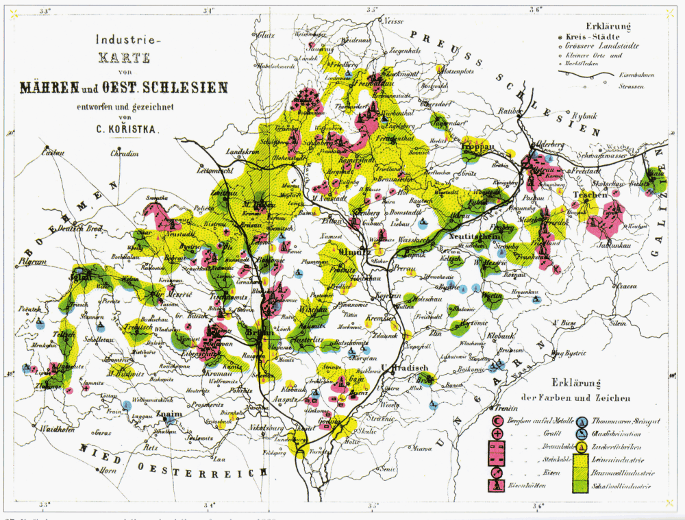 Kořistkova mapa moravského a slezského průmyslu z roku 1860